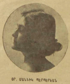 Մաննիկ Պերպերյանը